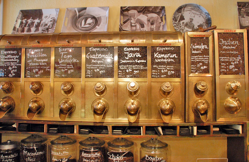 Kaffeeladen, coffeeshop in Reutlingen, Germany